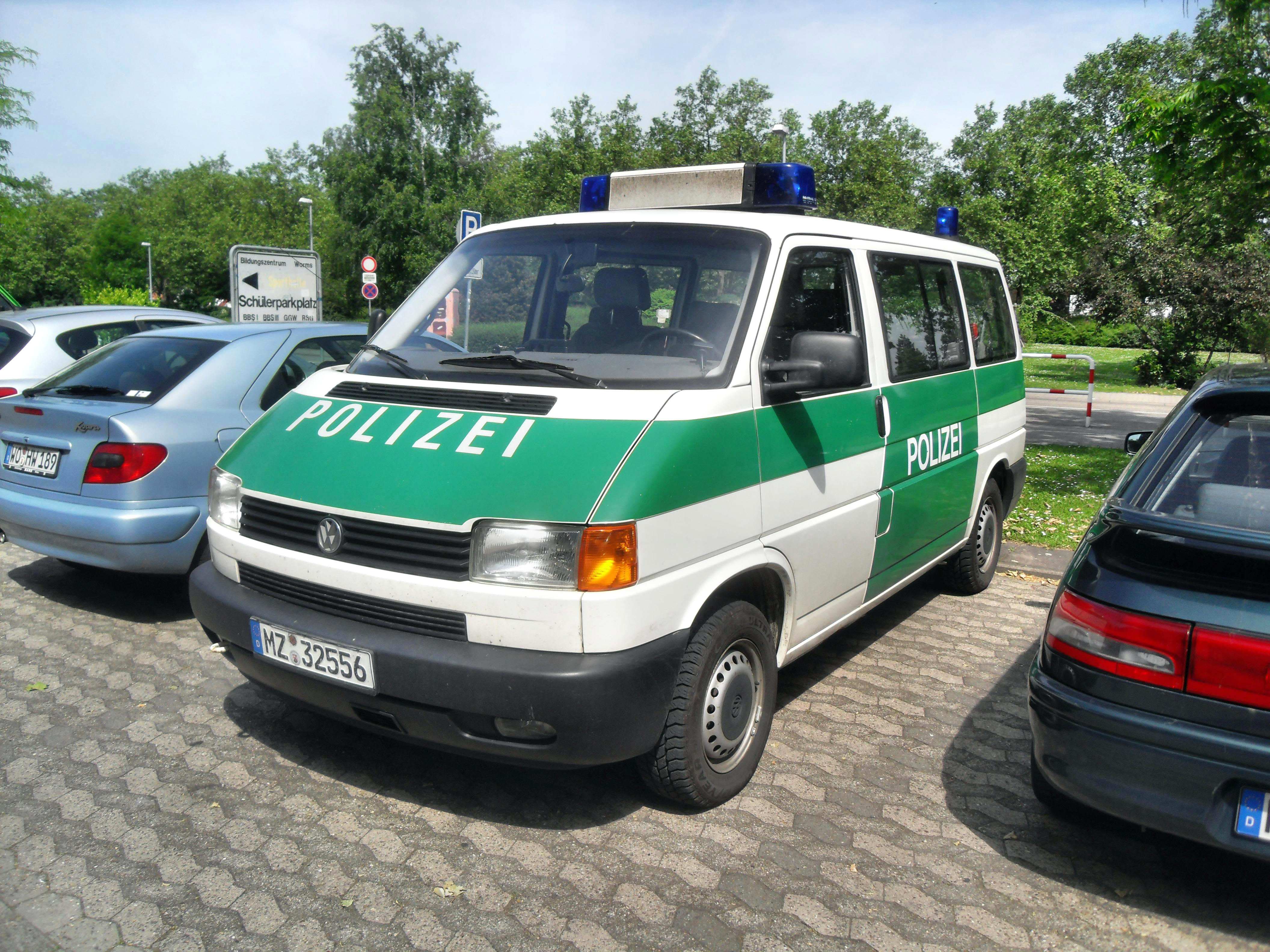 Streifenwagen der Polizei Rheinland-Pfalz im Bildungszentrum in Worms